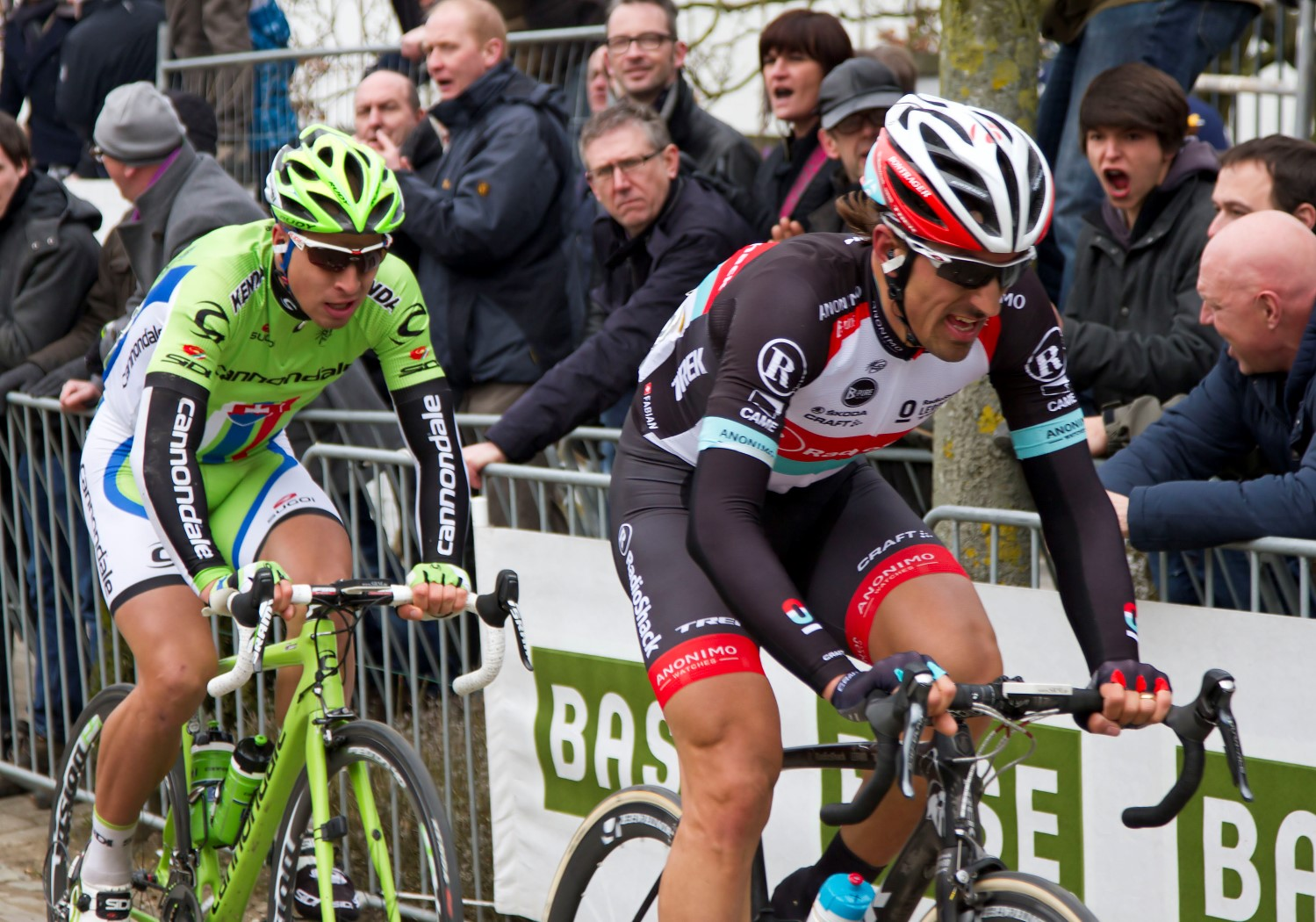 259 sagan en cancellara